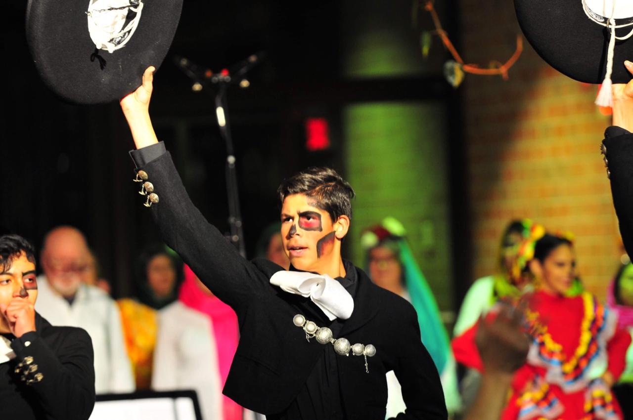 BFA